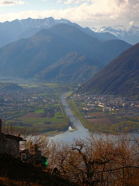 Alpe di Neggia View on Lago Maggiore (Maggia delta)